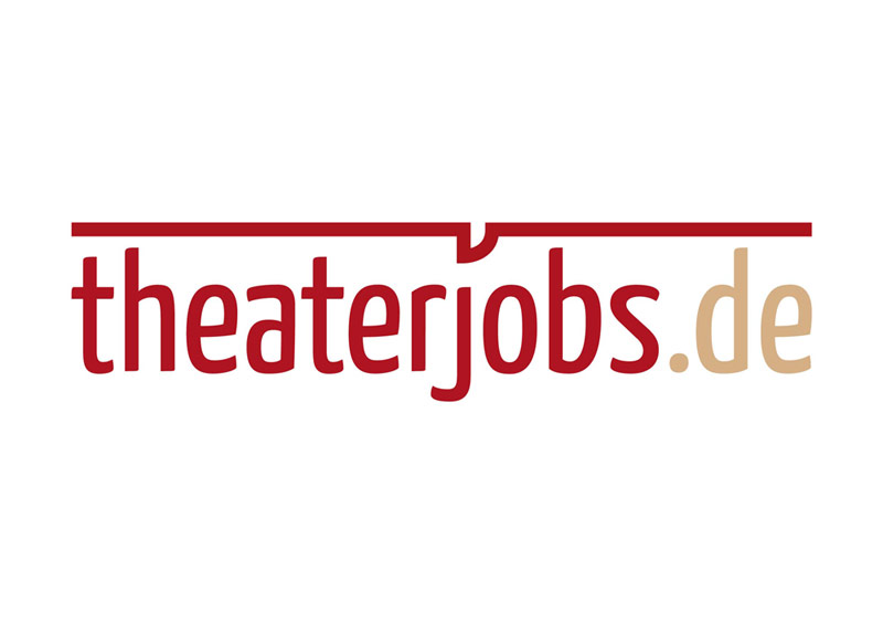 Logo von theaterjobs.de